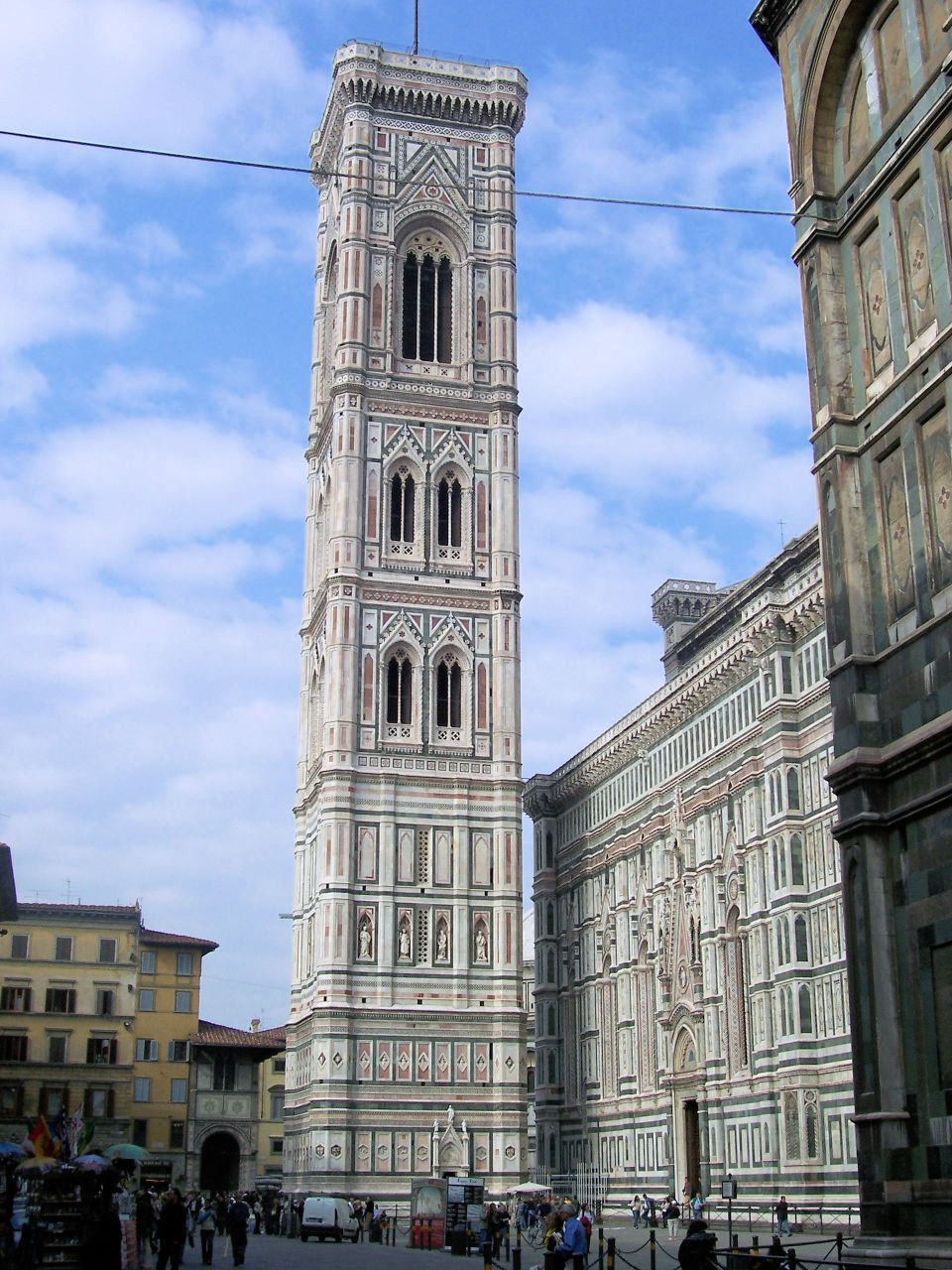 Campanile, Firenze, Italy